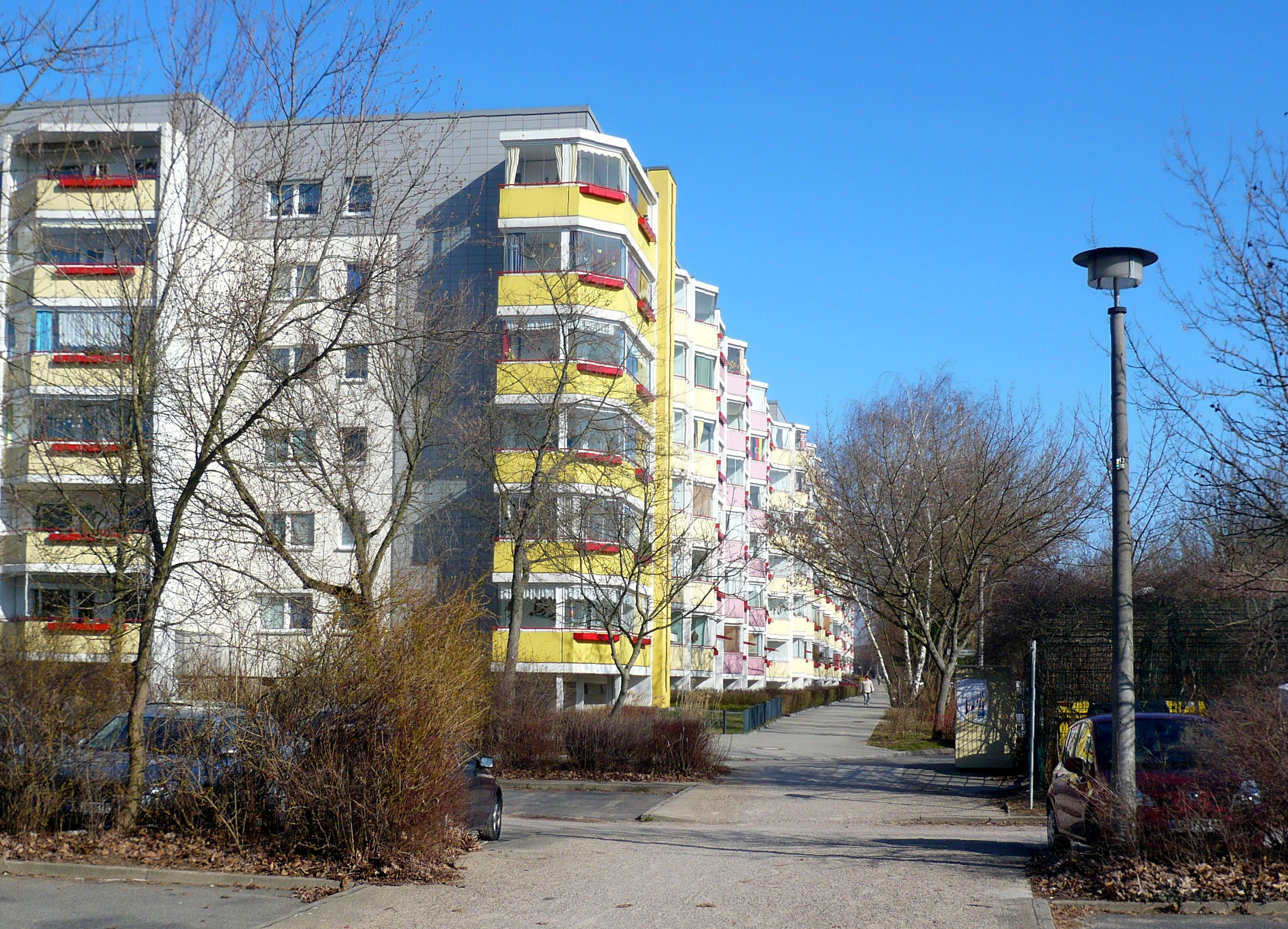 Ortsteil Marzahn, Marzahner Promenade: Windspiel